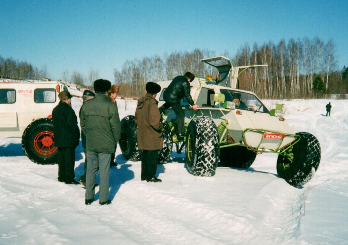 Арктика — вездеход-амфибия на шинах сверхнизкого давления, производился ассоциацией Арктиктранс.